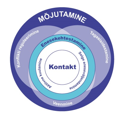 Esmase kompleksoskuse - kehtestamise - seosed ja asukoht suhtlusoskuste hulgas